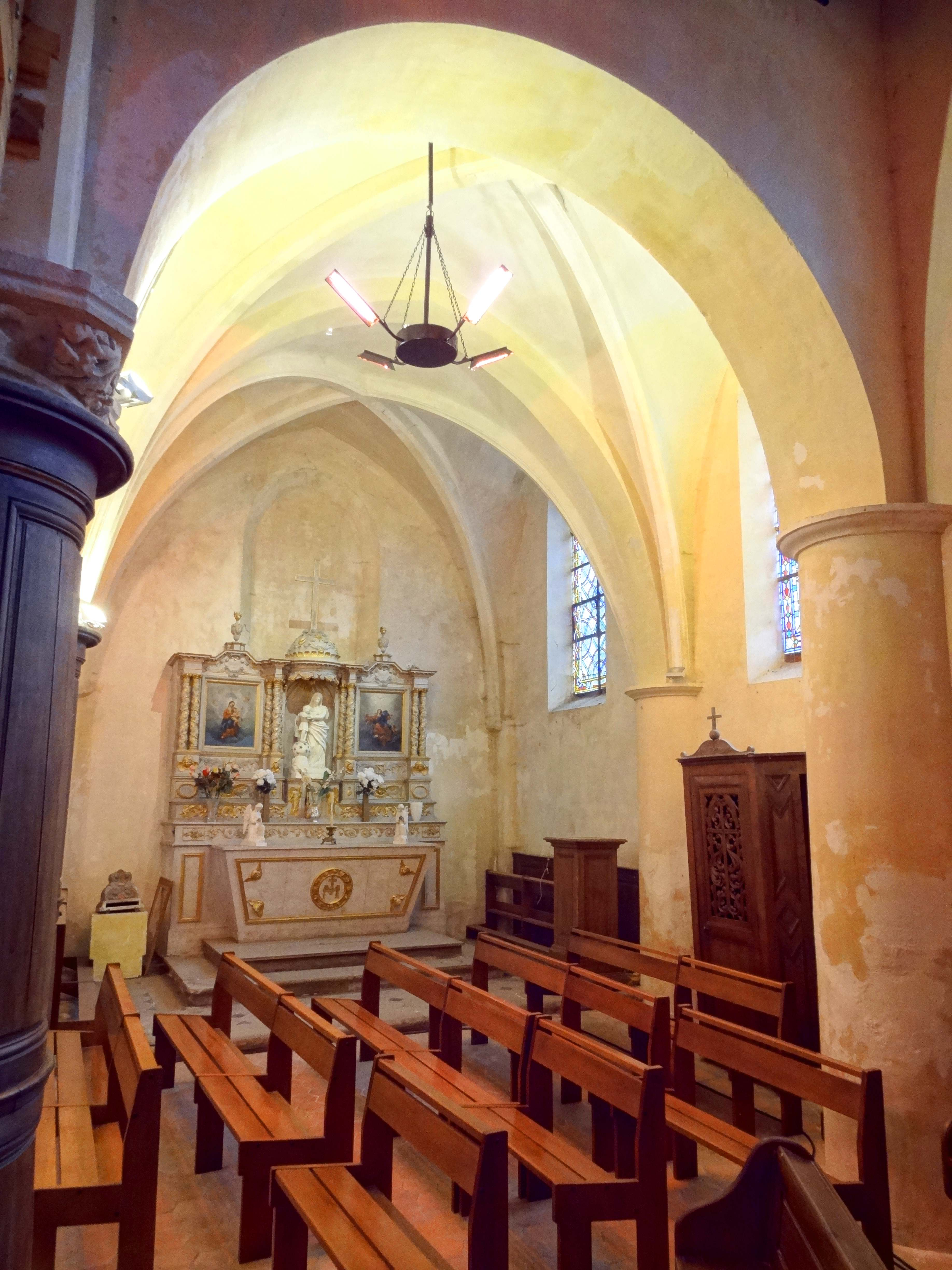 Intérieur de l'église - voir titre.